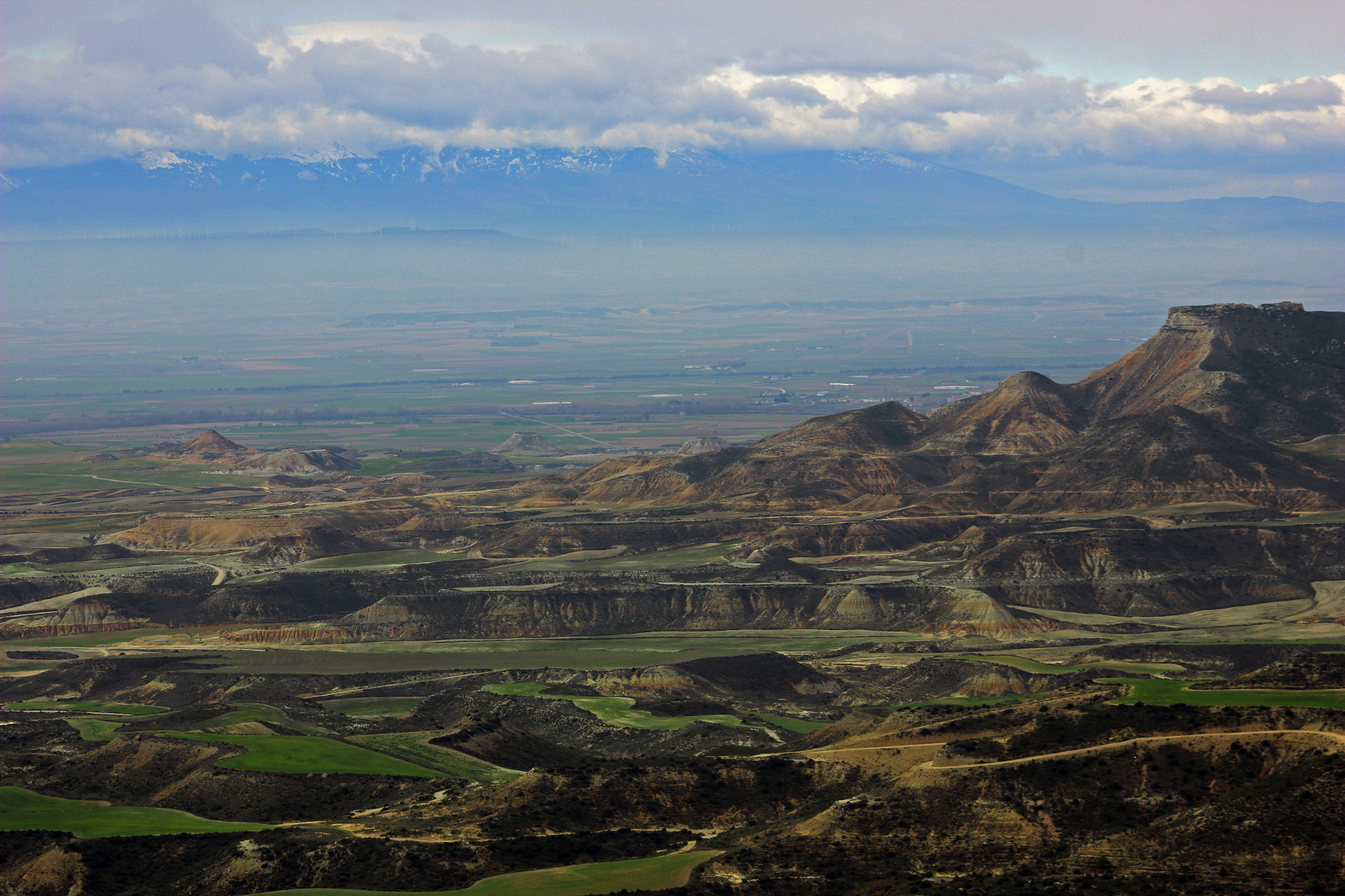 500px provided description: Desde el Santuario de Sancho Abarca - Tauste - Navarra